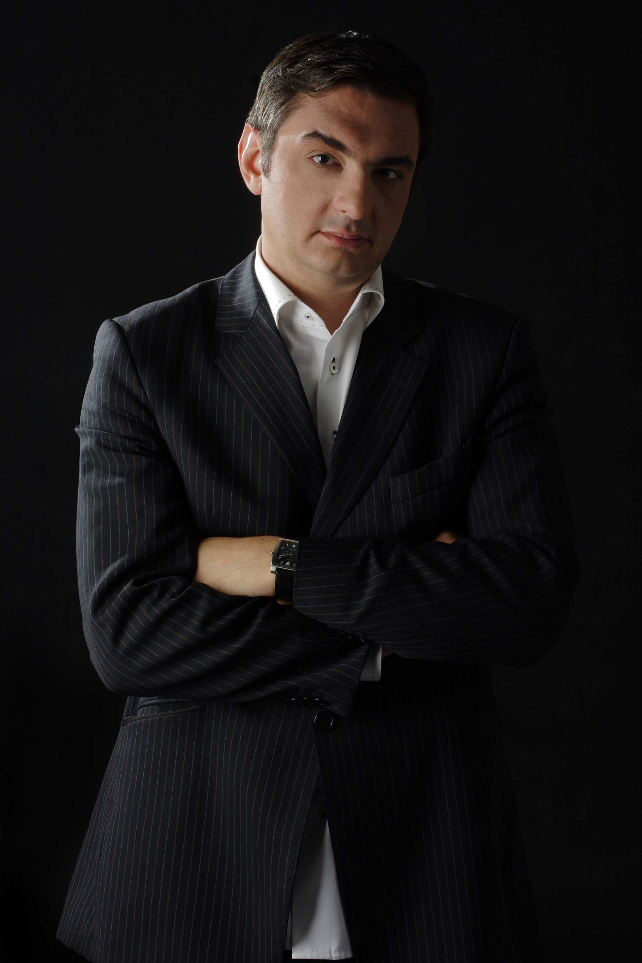 Миомир Петровић писац.